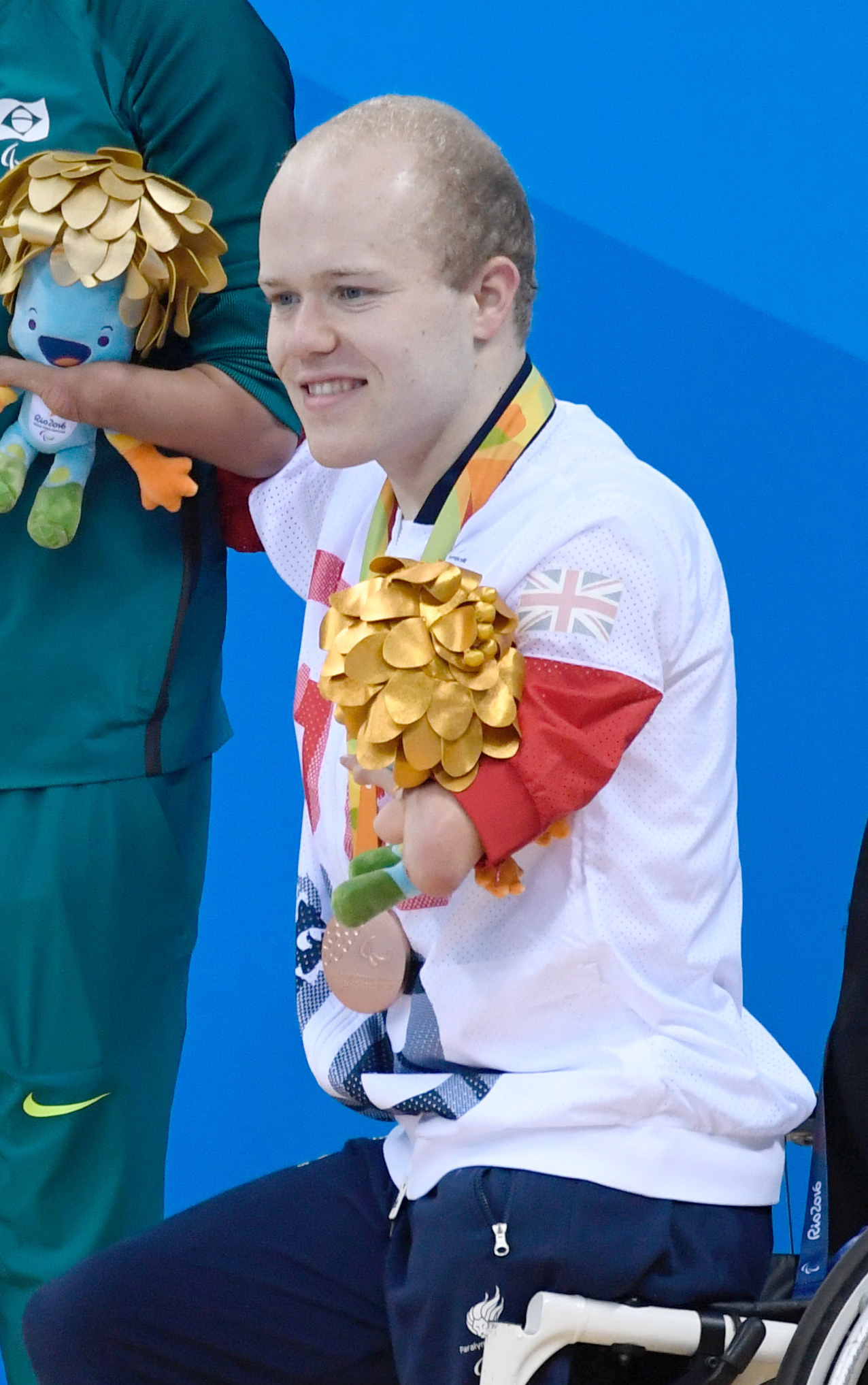 Rio de Janeiro - Brasileiro Daniel Dias leva medalha de ouro nos 200m nado livre S5 nos Jogos Paralímpicos Rio 2016, no Estádio Aquático